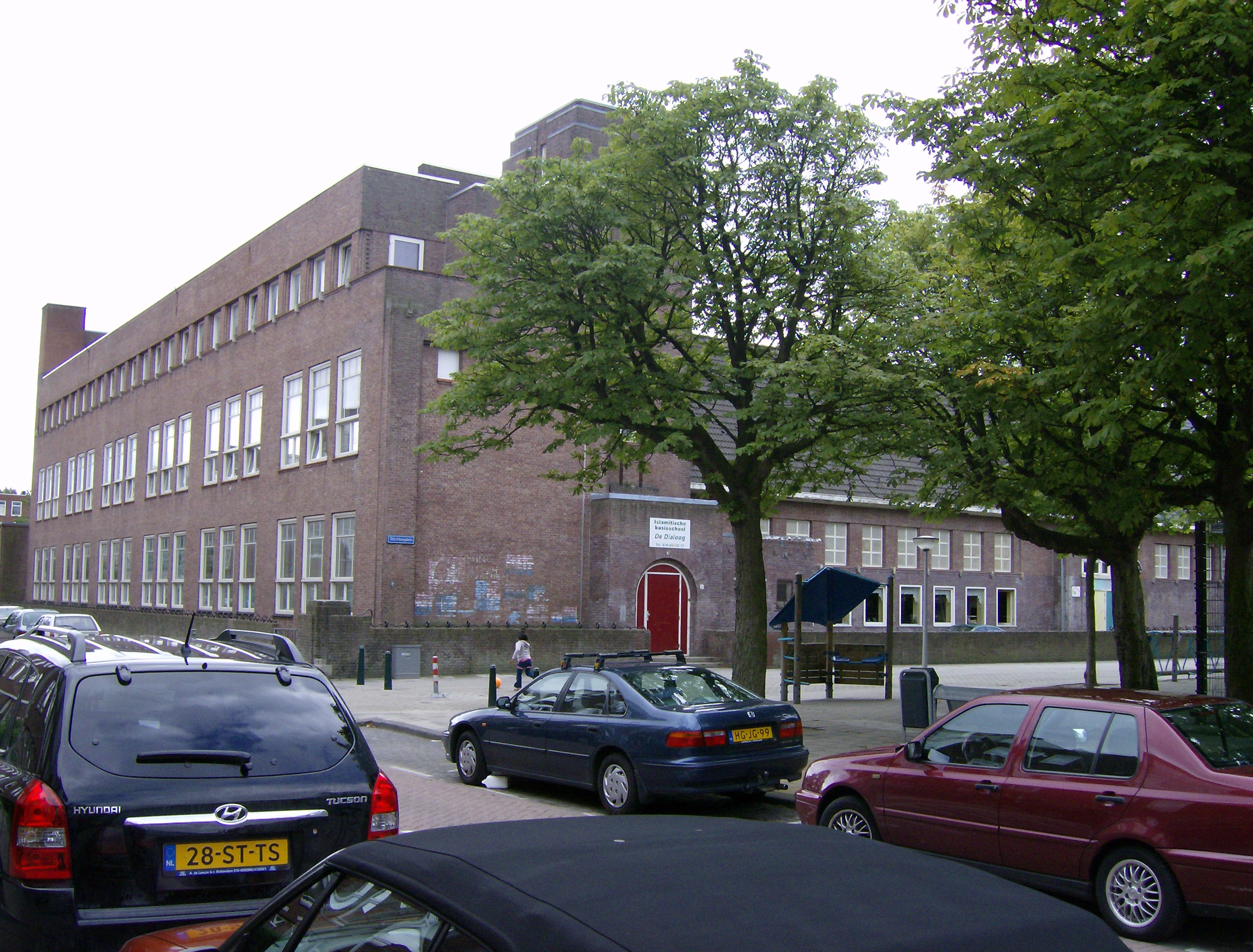 Voormalige Gereformeerde Scholengemeenschap. Tegenwoordig in gebruik als Islamitische Basischool, openbare basisschool en voor de Buurtvereniging Des '76.